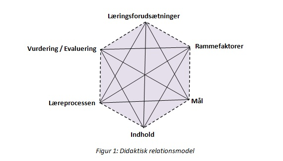 Den didaktiske relationsmodel.